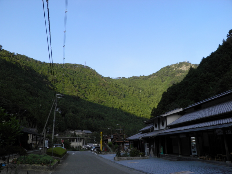 五社峠（奈良県吉野郡川上村）